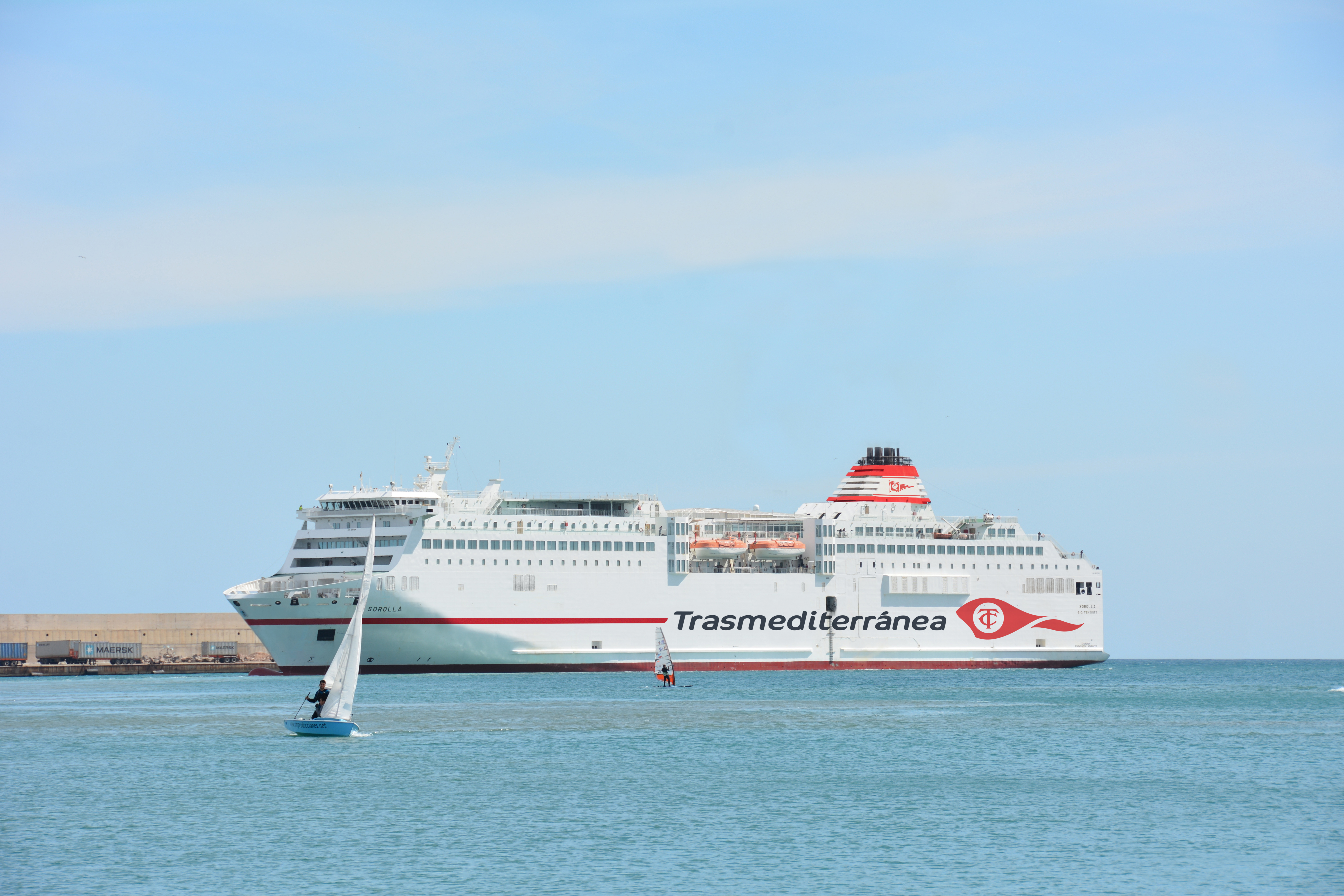 Trasmediterránea cuenta con una de las flotas más modernas y mejor dotadas de Europa, con los últimos avances tecnológicos en materia de seguridad y calidad en los servicios a bordo.